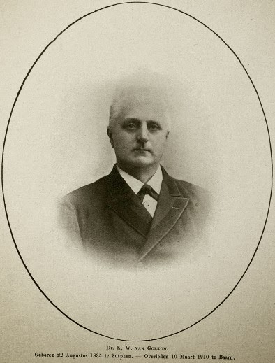 Karel Wessel van Gorkom